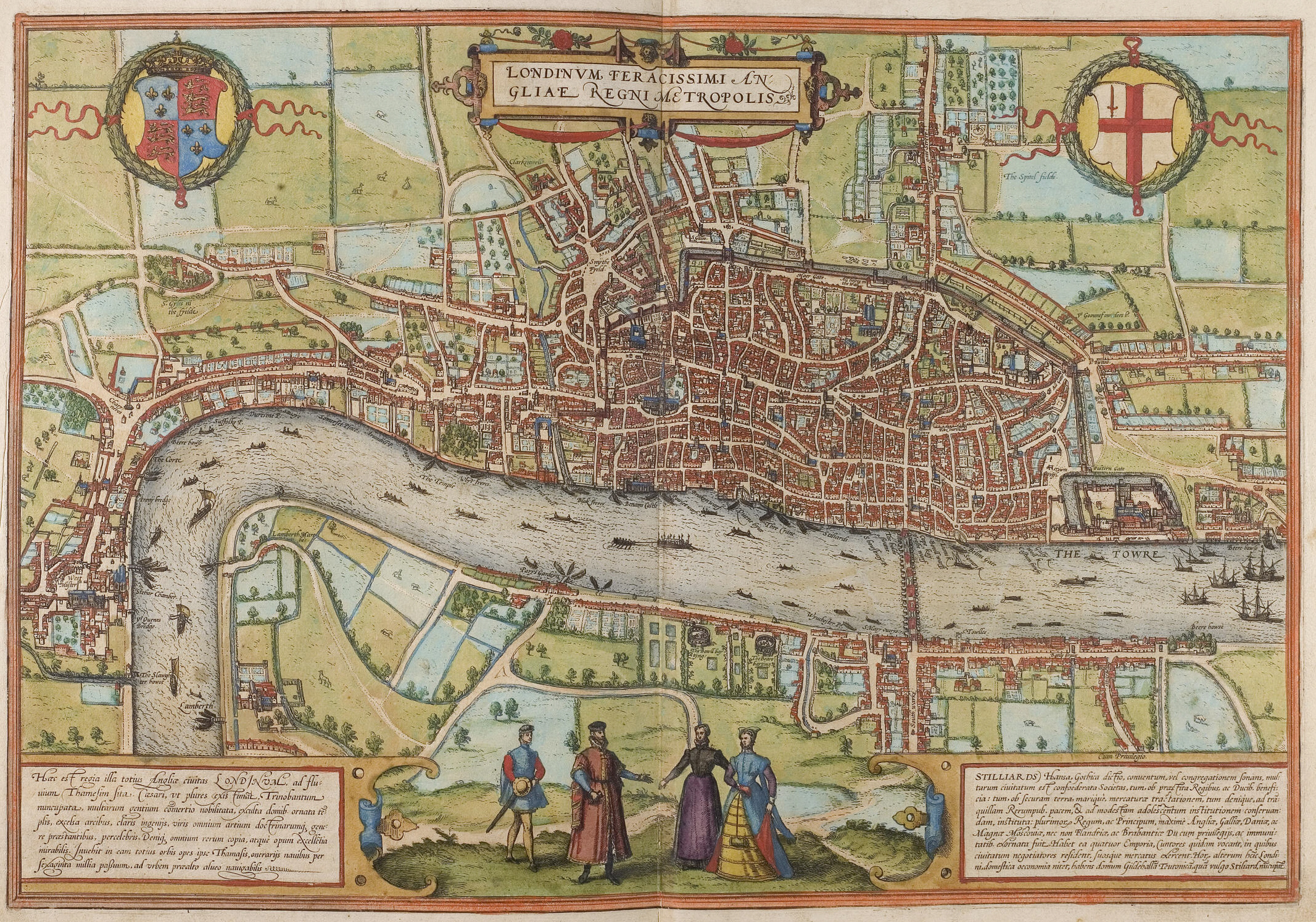 London